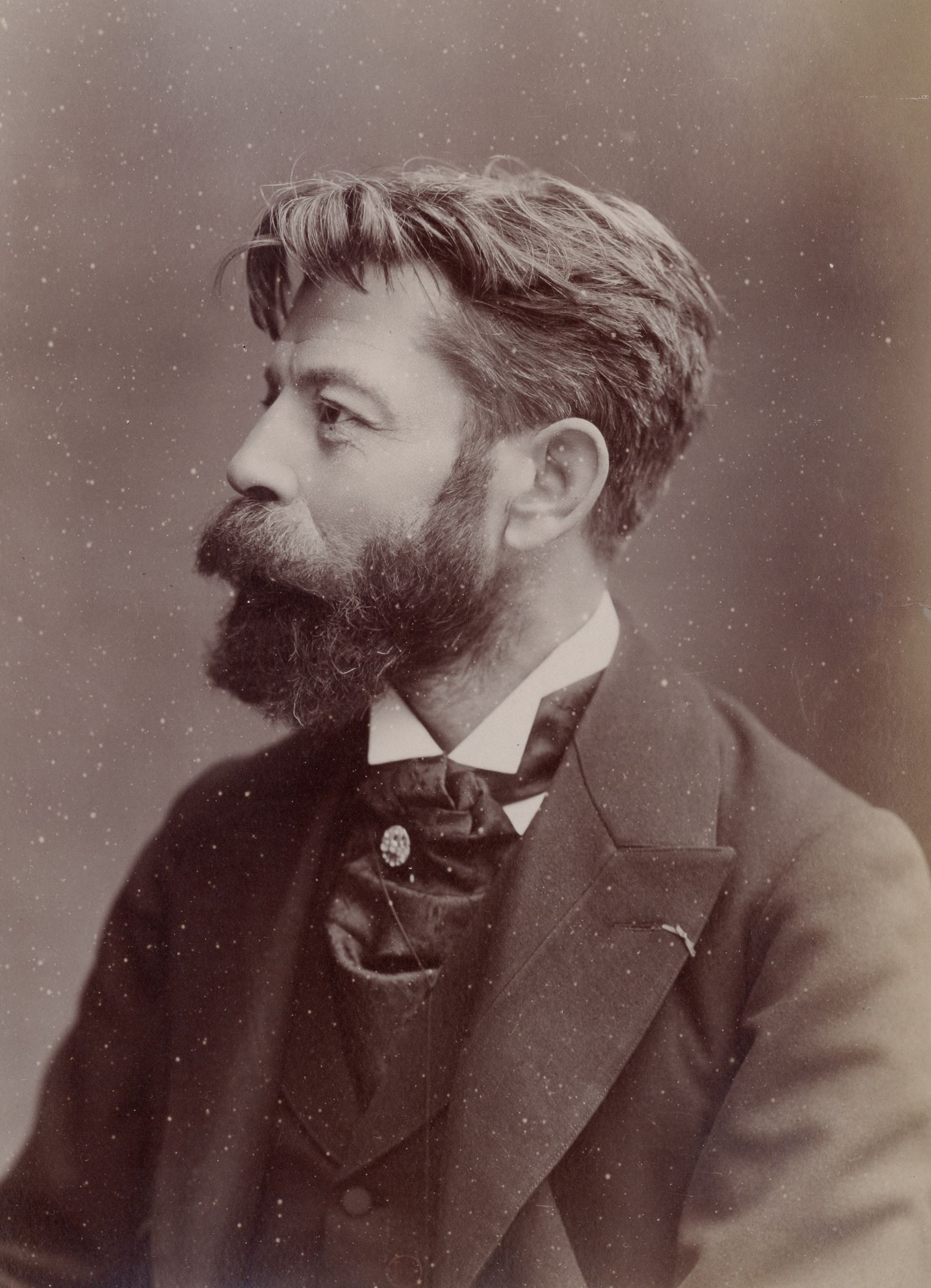 M. Fraipon [i.e. Fraipont] (peintre).